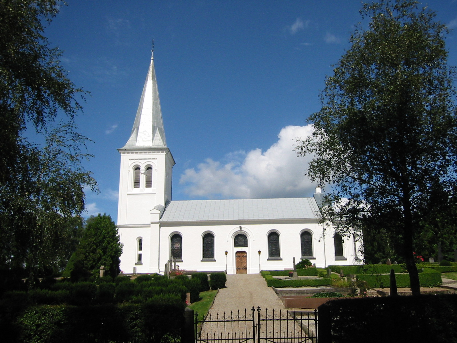 Munkarps kyrka